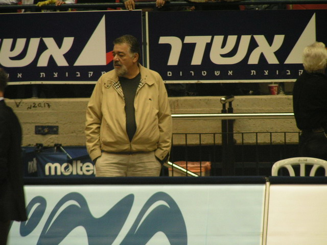 רפי גינת, היה הכרוז של מכבי ת"א במשך שנים במשחקי היורוליג